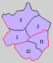 後の鹿児島県伊佐郡域の町村制時点の町村。